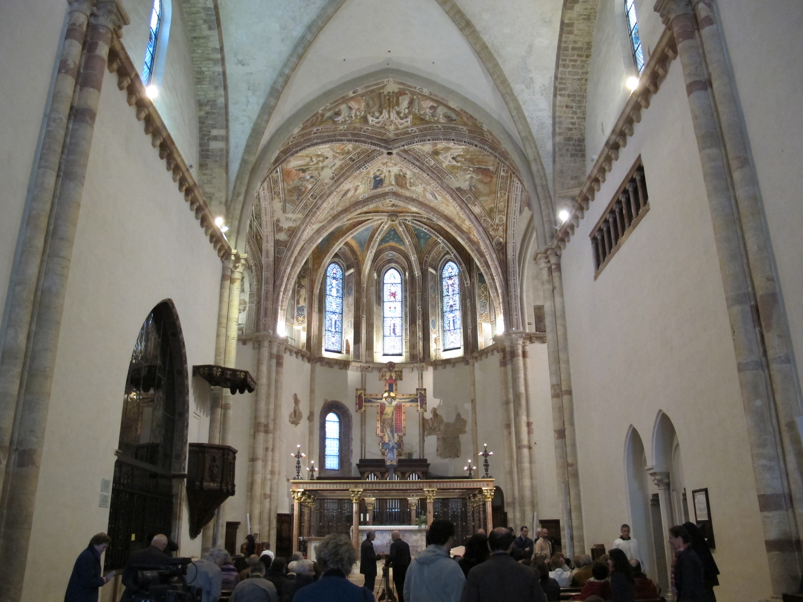 Assisi, santa chiara, interno